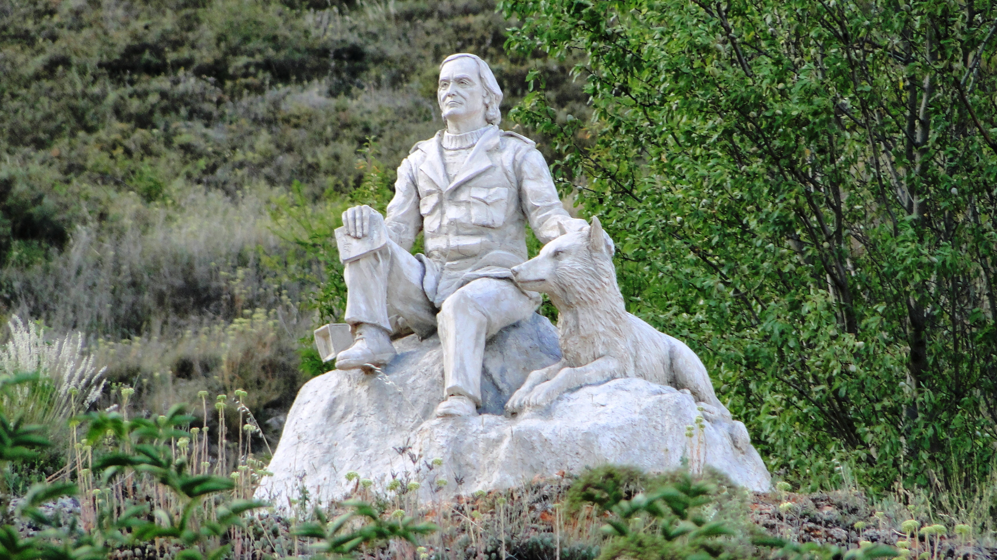 Monumento a Félix Rodriguez de la Fuente en Poza de la Sal (Burgos)